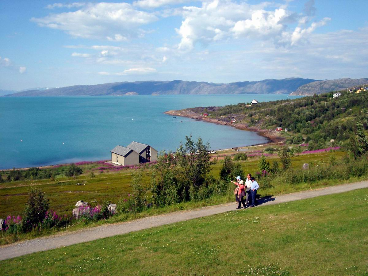 Altafjord Norwegen